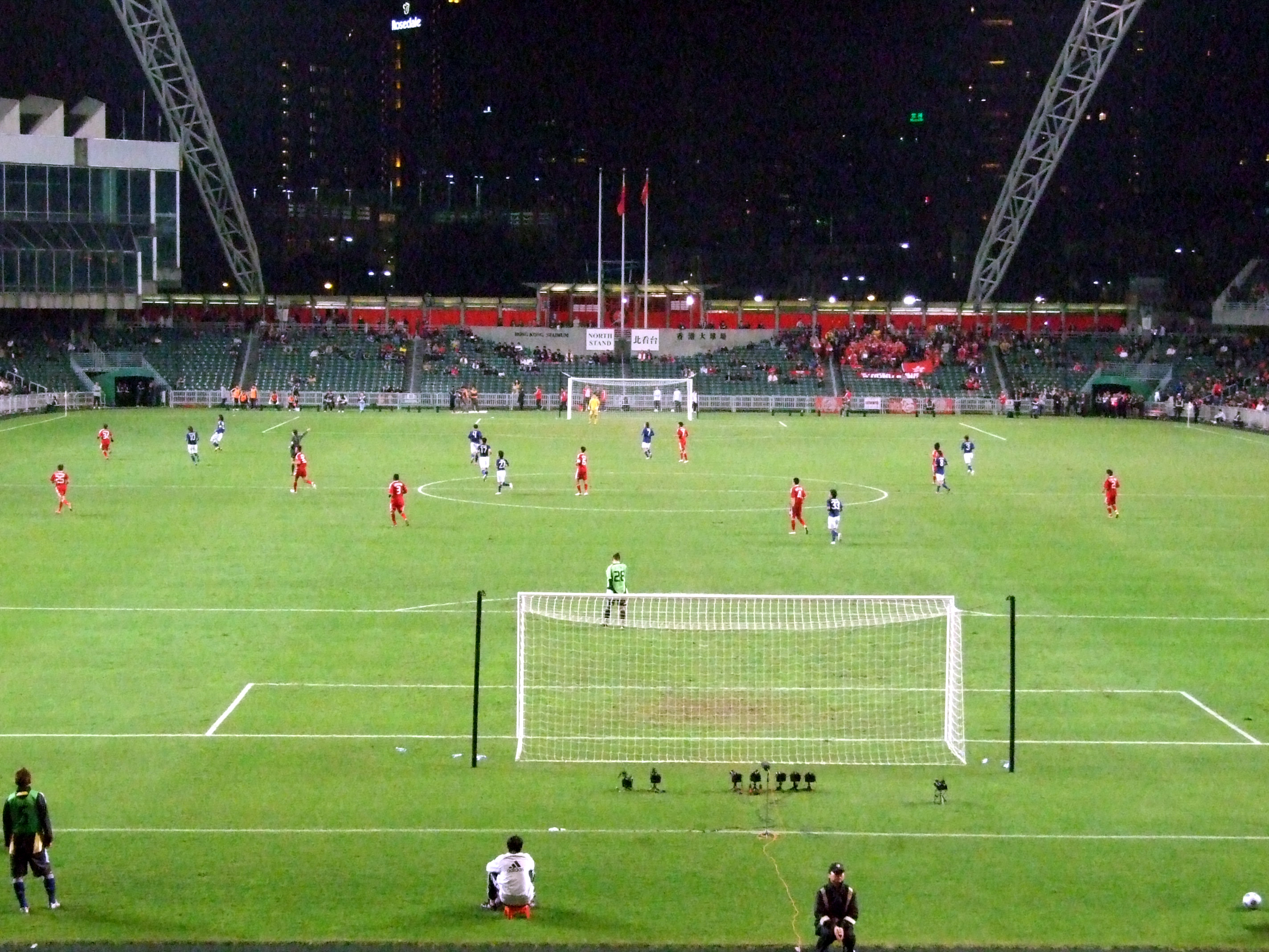 2010年世界盃外圍賽香港足球代表隊主場對日本